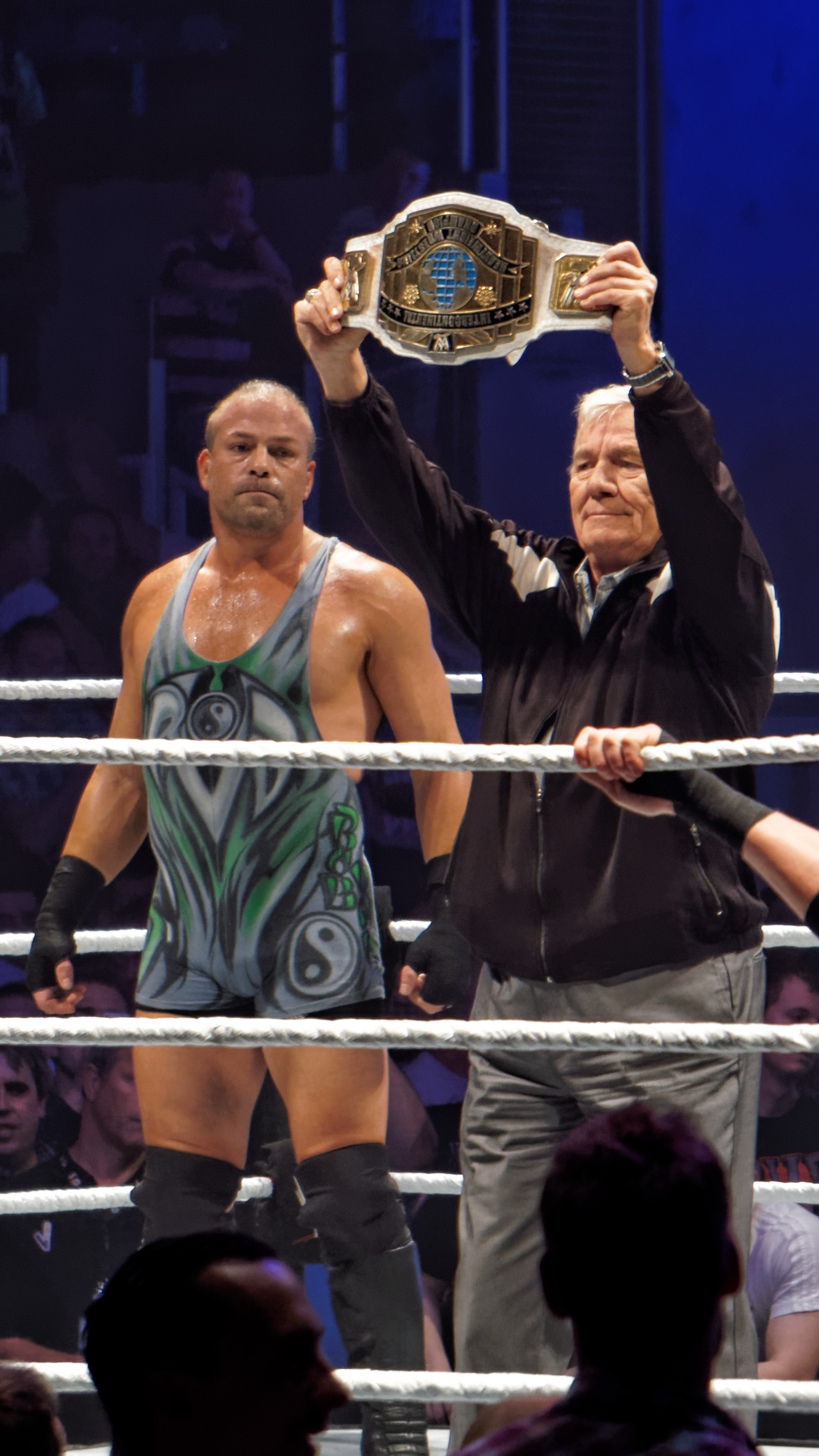 2014-05-22_21-55-40_ILCE-6000_2018_DxO